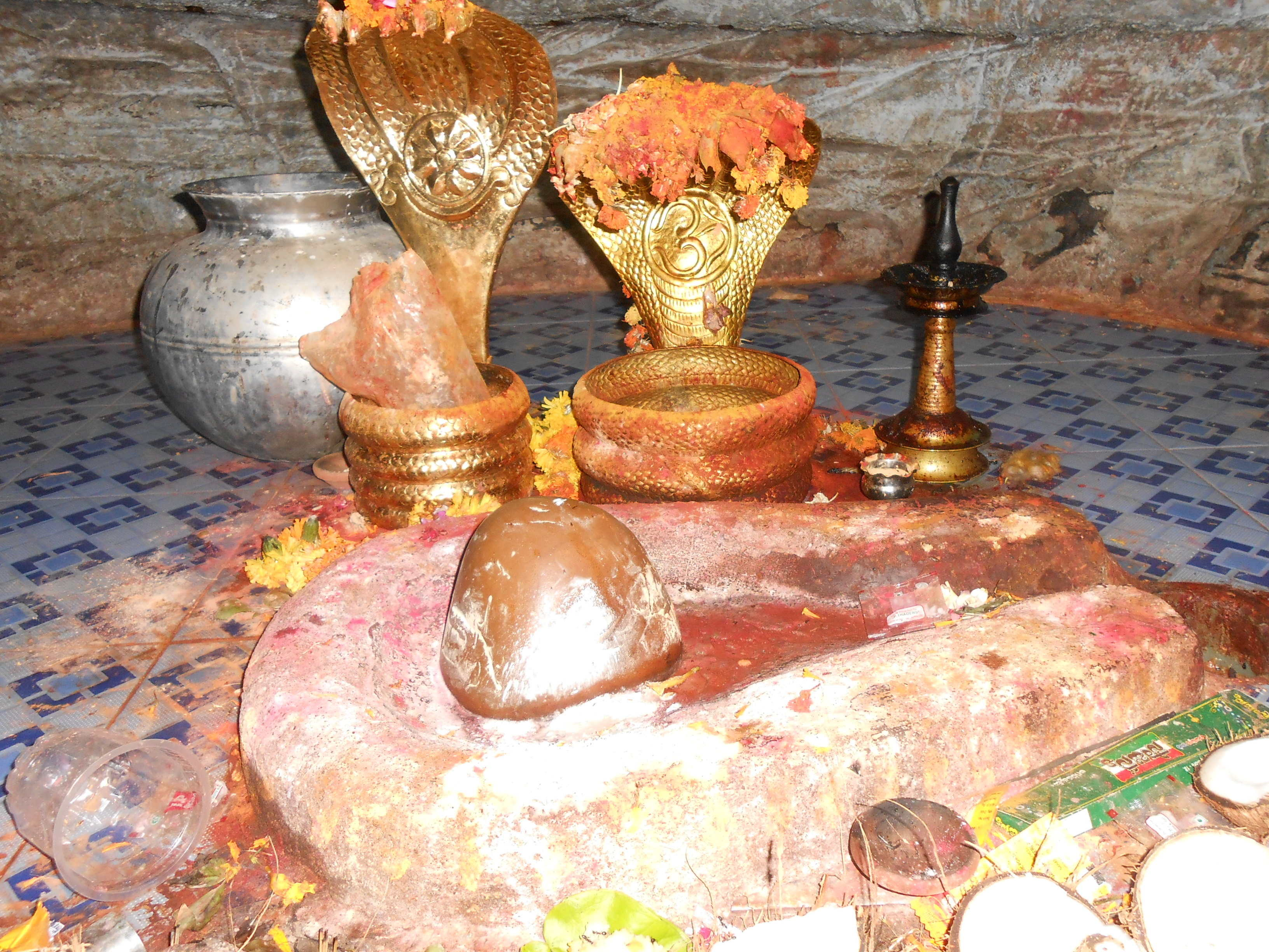 దైద అమరలింగేశ్వరస్వామి